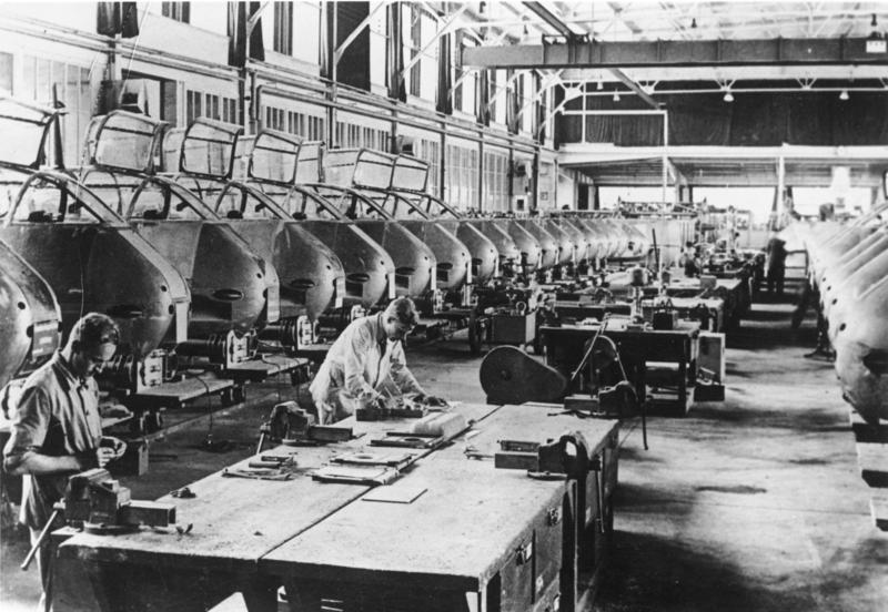 Neues deutsches Flugzeugmuster: Bei den Kämpfen an allen Fronten hat sich in der letzten Zeit ein neues Mehrzweckflugzeug, die Me 210, hervorragend bewährt. Mit diesem Flugzeug wurde der deutschen Luftwaffe ein neues schlagkräftiges Kampfmittel geschaffen. UBz: Mittelflügel auf der Taktstrasse.